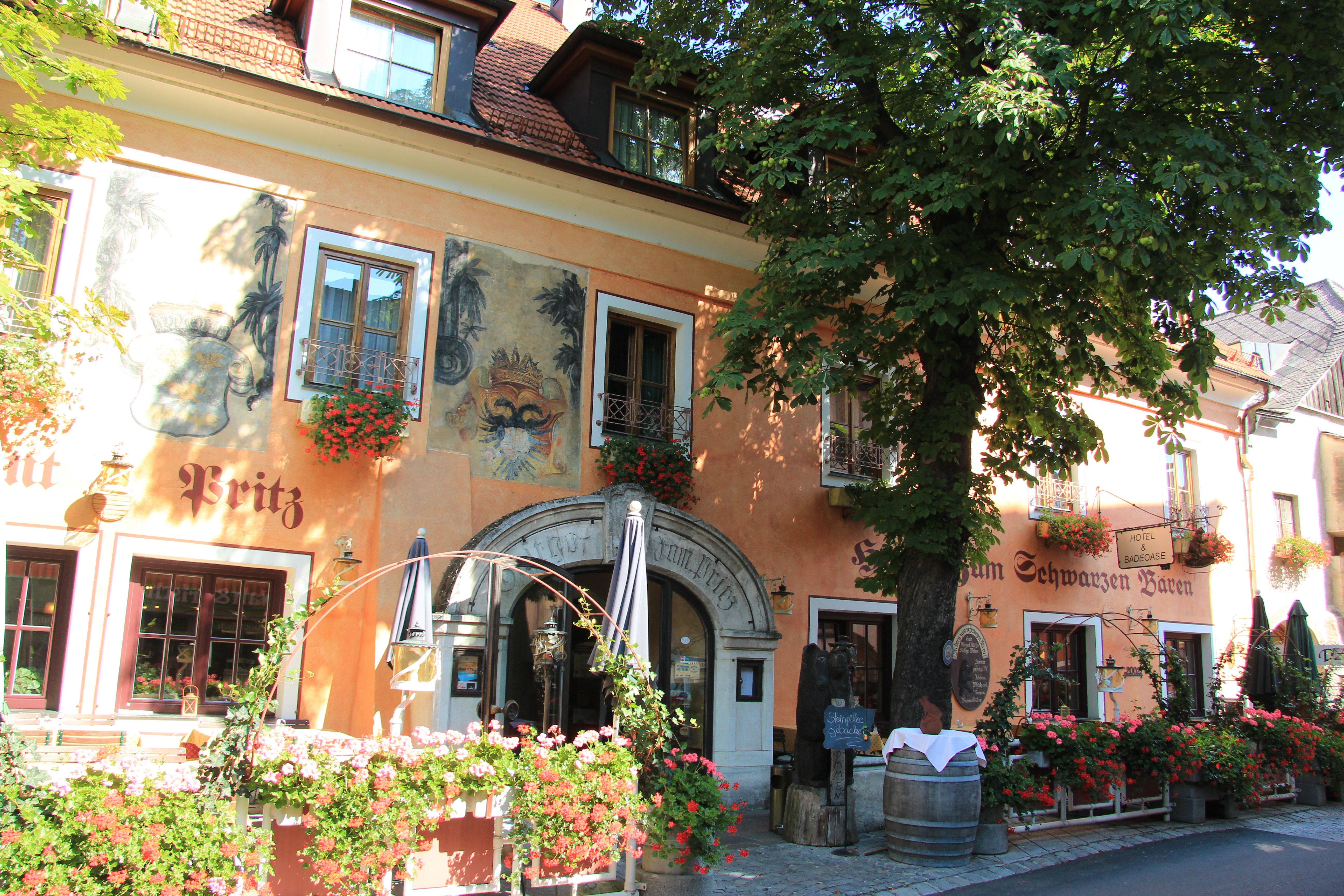 altes Hotel in Emmersdorf, Zum schwarzen Bären.